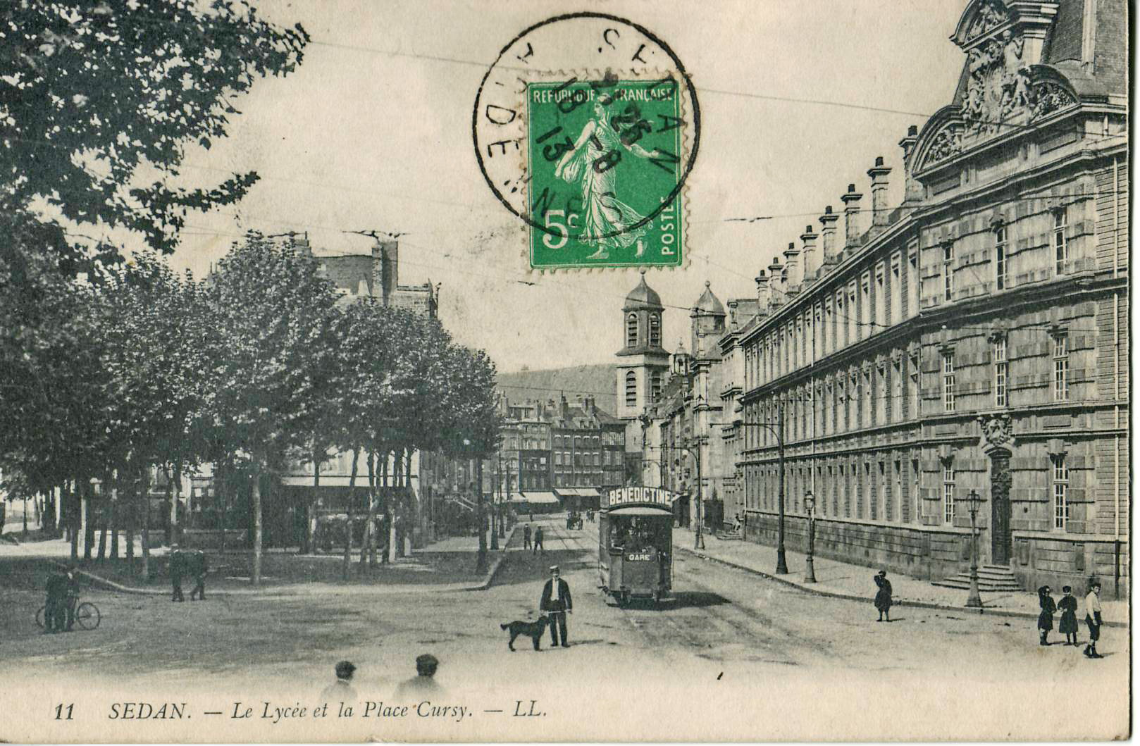 Carte postale ancienne éditée par LL, n°11 :SEDAN - Le Lycée et la Place Cursy